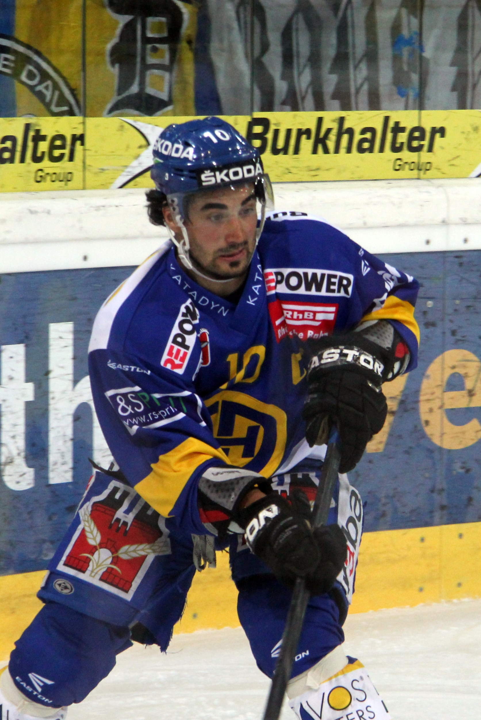 Andres Ambühl (D 10).